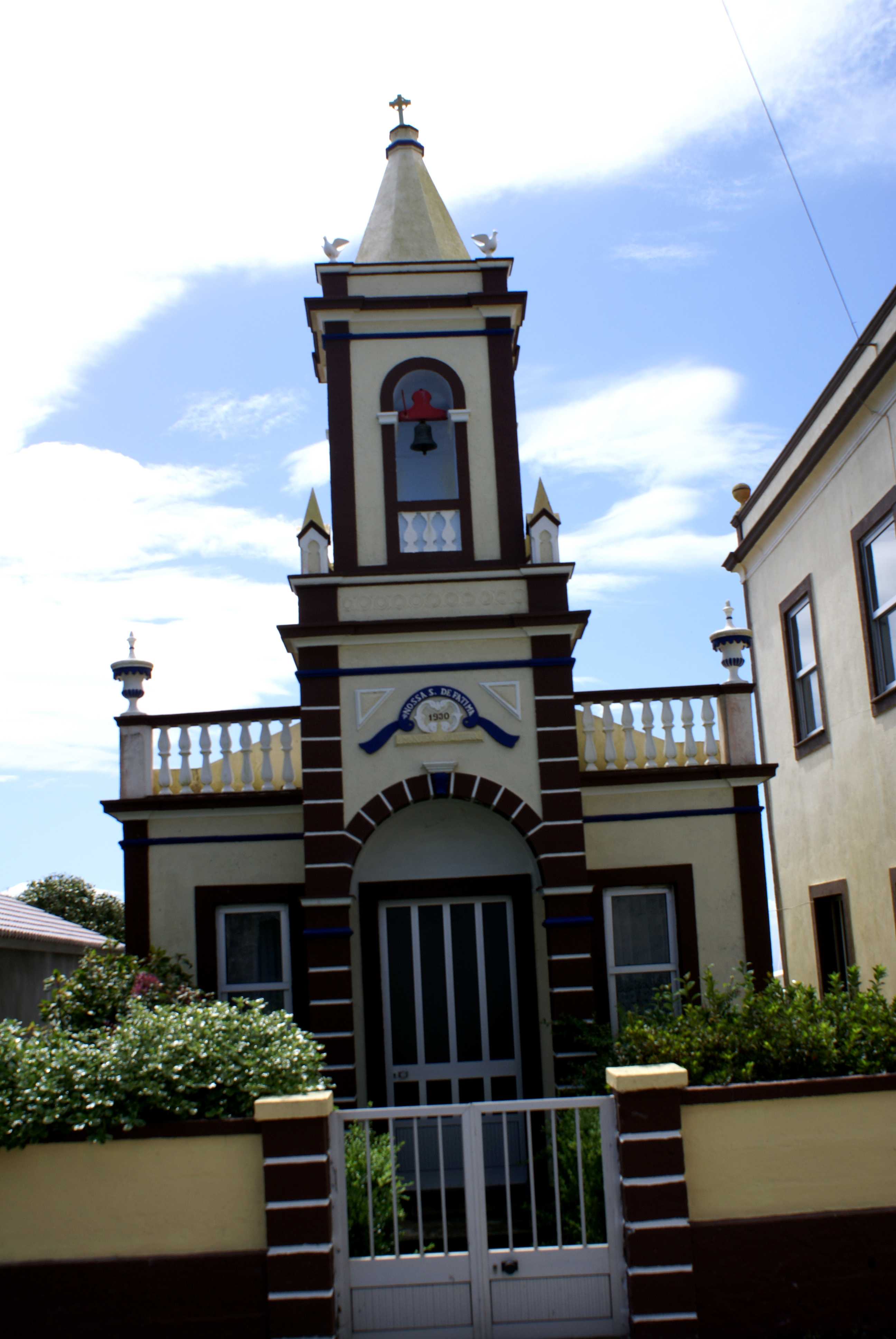 Ermida de Nossa Senhora de Fátima, fachada, Santo amaro, Velas, ilha de São Jorge, Açores